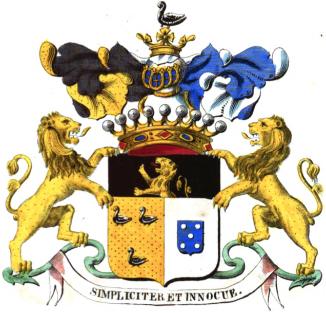 Armoiries de la famille Goblet d'Alviella. Blasonnement: "parti d'or, à trois merlettes de sable, et d'argent, à l'écusson d'azur, chargé de cinq besans d'argent, pointés de sable, posés en sautoir, au chef de sable, au lion issant d'or, armé et lampassé de gueules." L'écu couvert d'une couronne de comte, surmonté d'un heaume d'argent, orné, grillé et couronné d'or, fourré d'azur, aux lambrequins à dextre d'or et de sable, à senestre d'argent et d'azur. Cimier: une merlette de l'écu. Supports: deux lions d'or, le tout posé sur une terrasse de sinople. Devise: "Simpliciter et innocue".